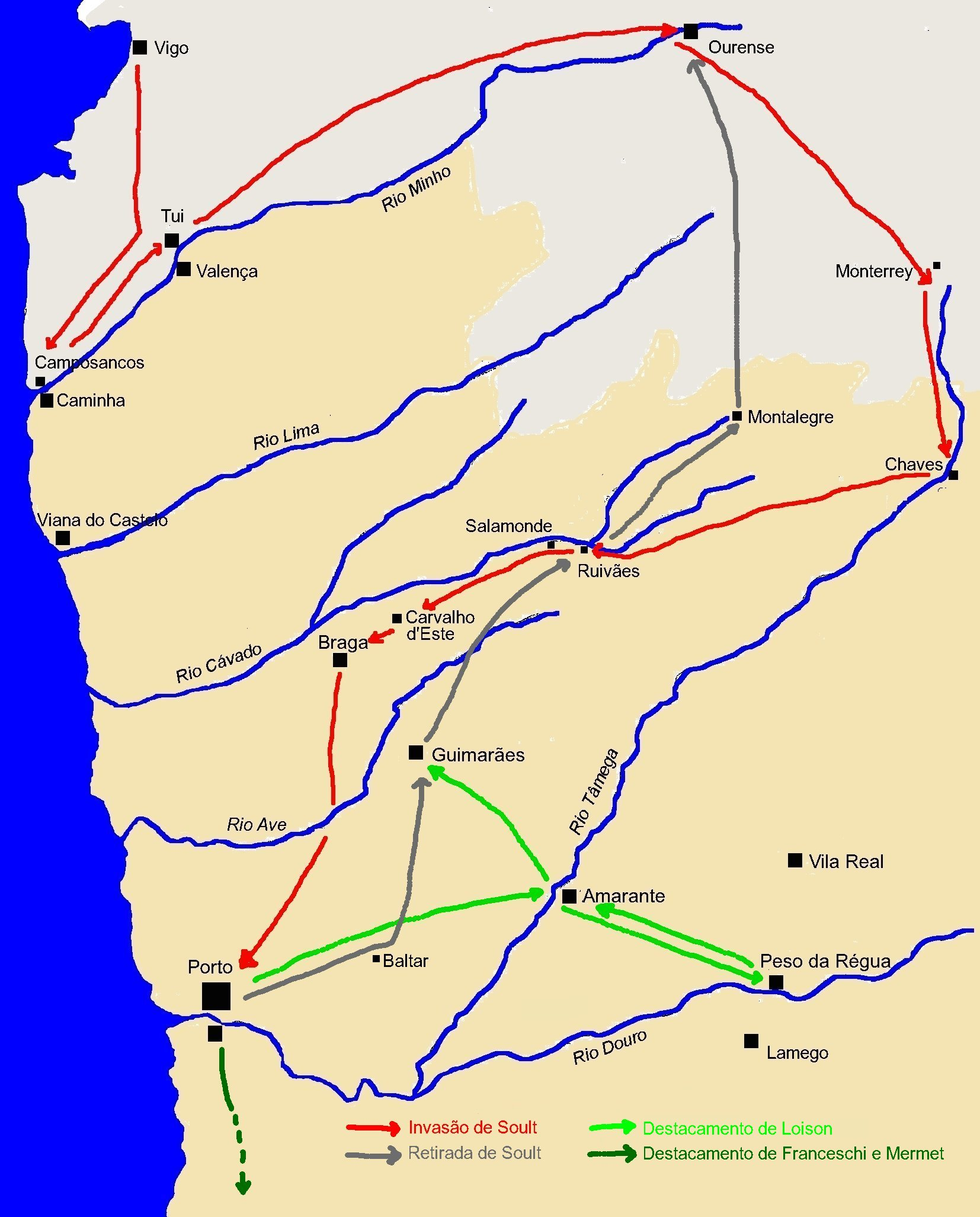 Principais movimentos das forças francesas durante a Segunda Invasão Francesa de Portugal